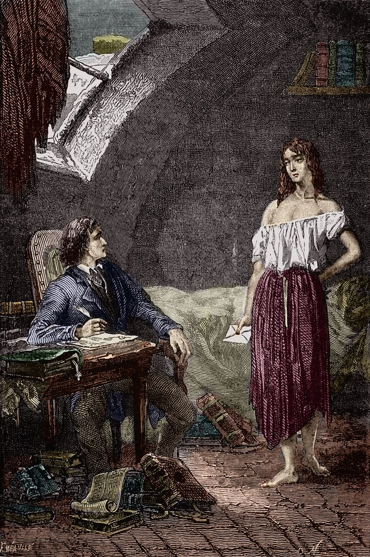 Éponine remet la lettre à Marius.